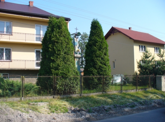 Wieś Zelczyna w województwie małopolskim